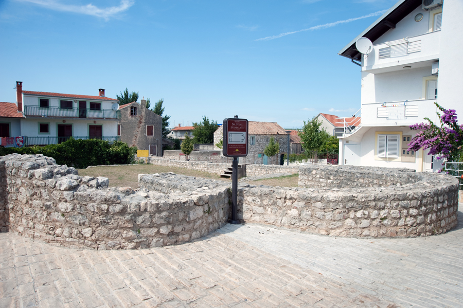 Biograd na Moru